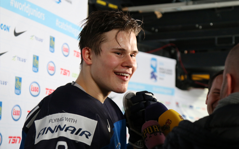 Jesse Puljujärvi haastateltavana nuorten mm-kisoissa 2016